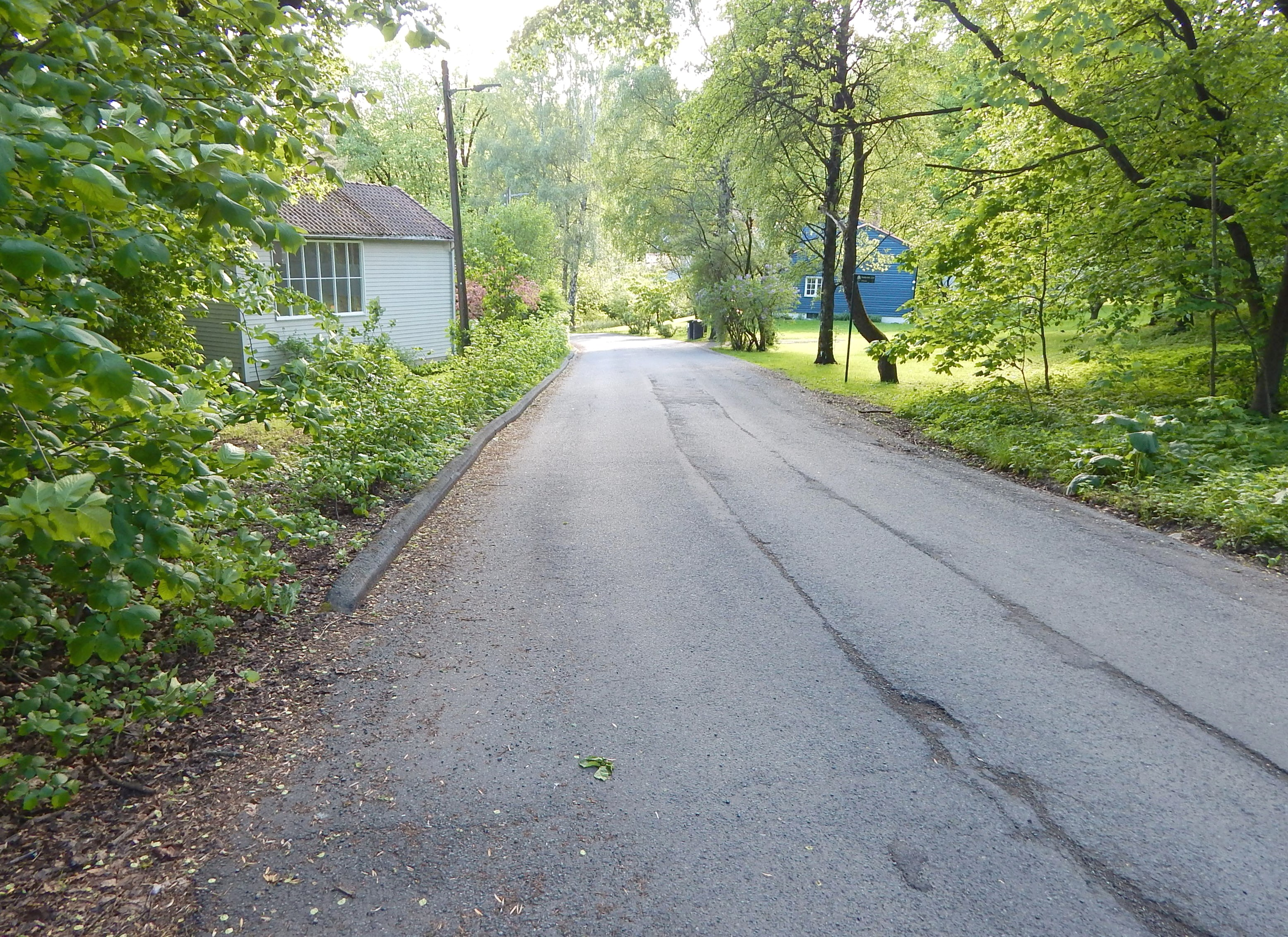 Sankt Georgs vei